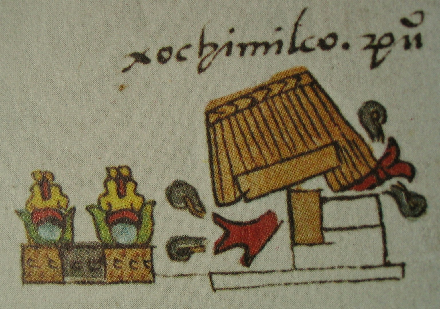 Registro de la derrota de Xochimilco por parte de los mexicas en el Cödice Mendocino.